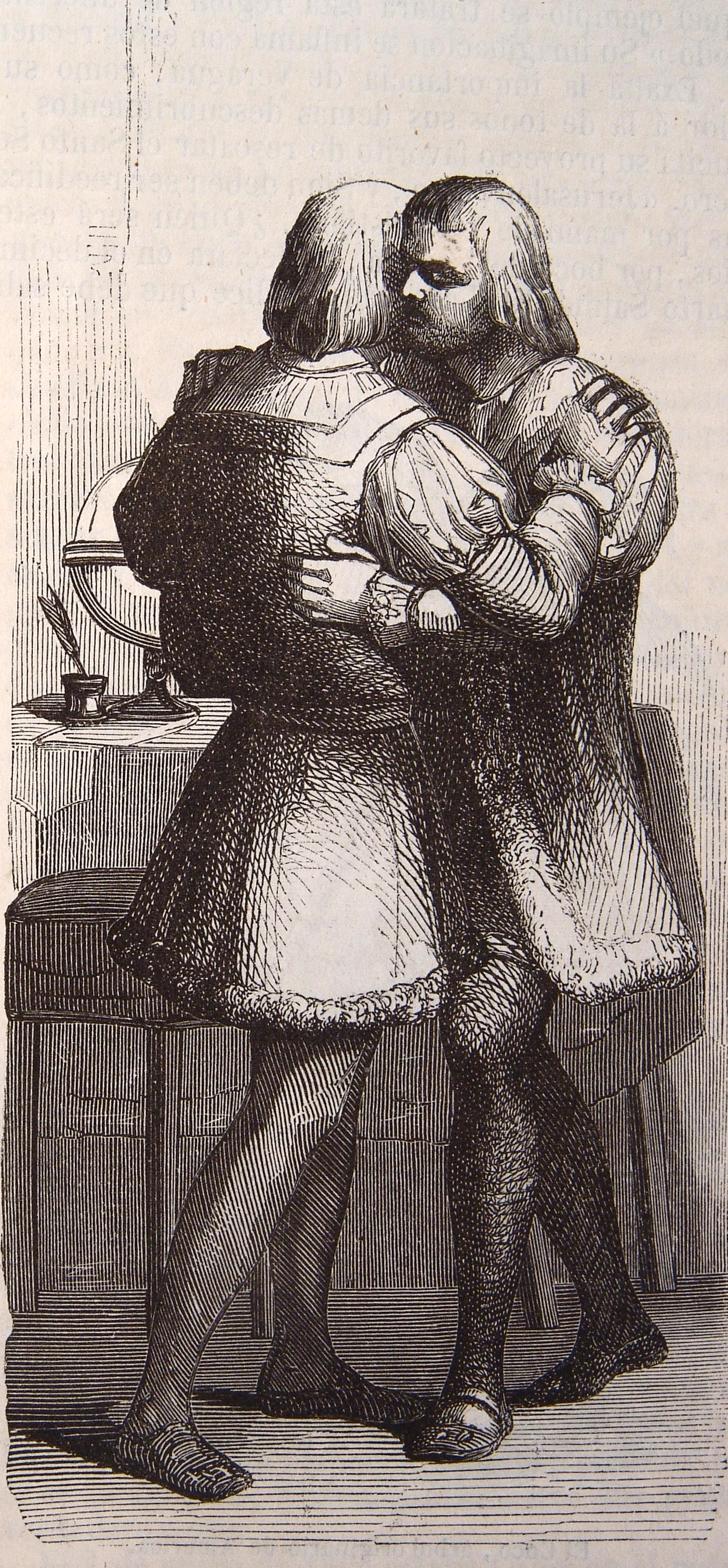 Colón abrazó al bravo Mendez...